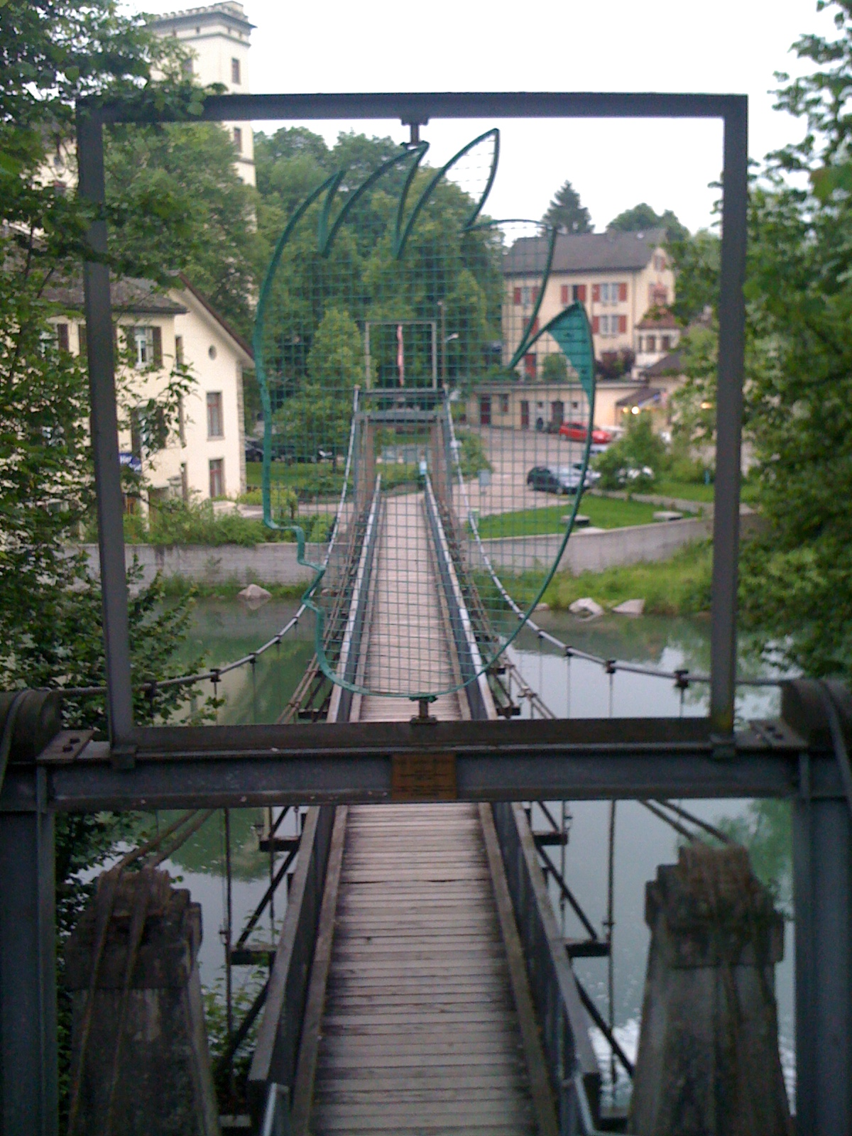 Gwaggelibrugg über die Limmat zwischen Wettingen und Neuenhof